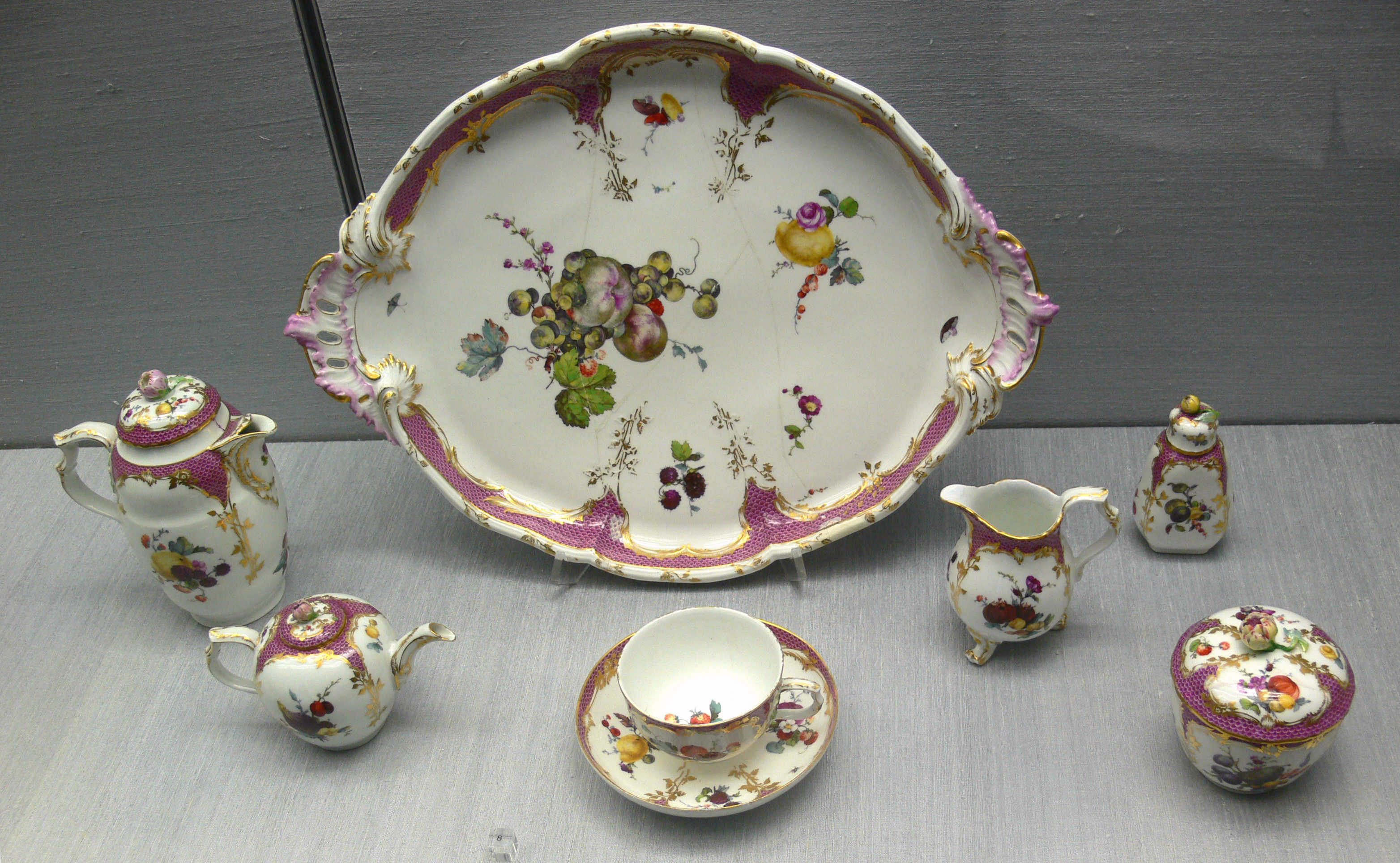 Frühstücksservice „mit Früchten und Blumen, bunte Guirlanden, purpurner Mosaique und Goldener Grotesque“ (Modell „Neuzierrat“), Tablett, Schokoladenkanne, Teekanne, Milchkännchen, Zuckerdose, Tasse mit Untertasse, Teebüchse Kunstgewerbemuseum Berlin, Inv. Nr. 1903,39-40; 1903,101–105